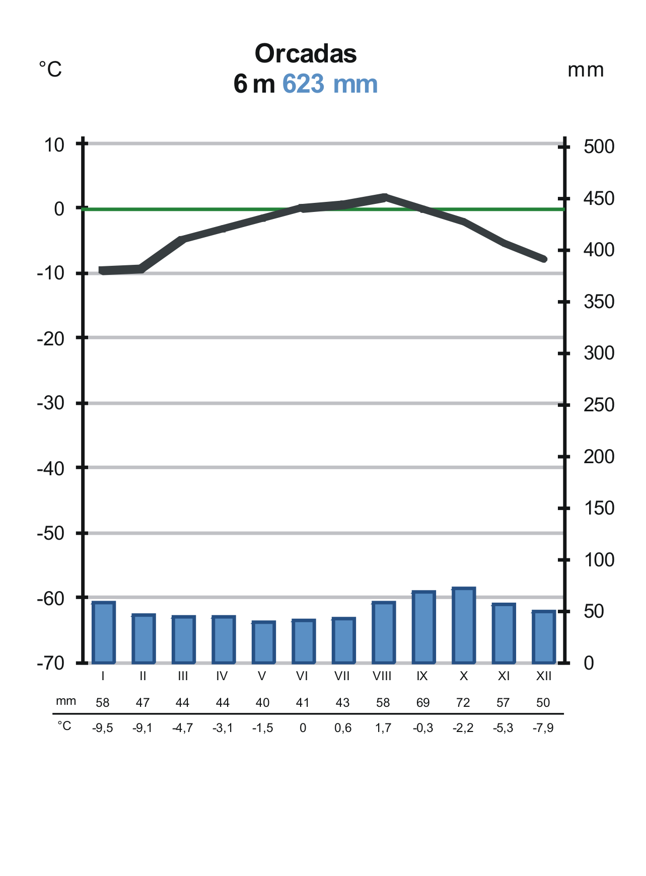 Orcadase polaarjaama kliimadiagramm